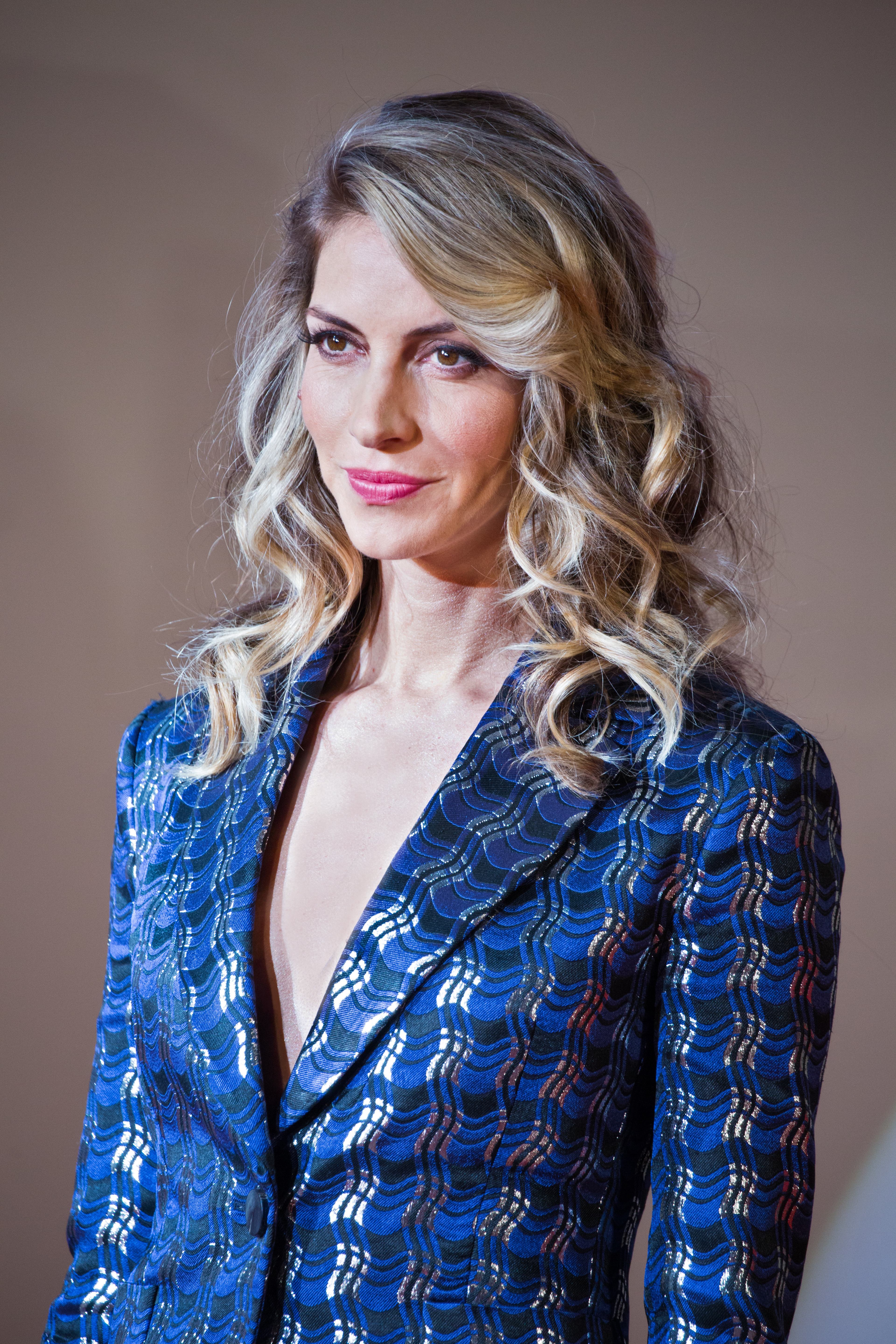 ブライト ジャパン・プレミア レッドカーペット ドーン・オリヴィエリ